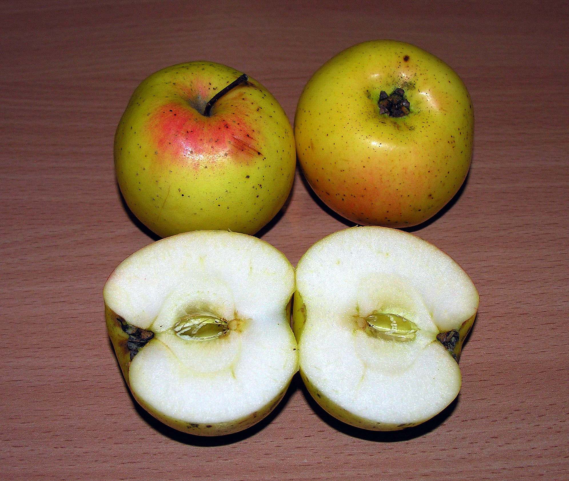 Telisare 2008 m. sausio 24 d., Lietuva